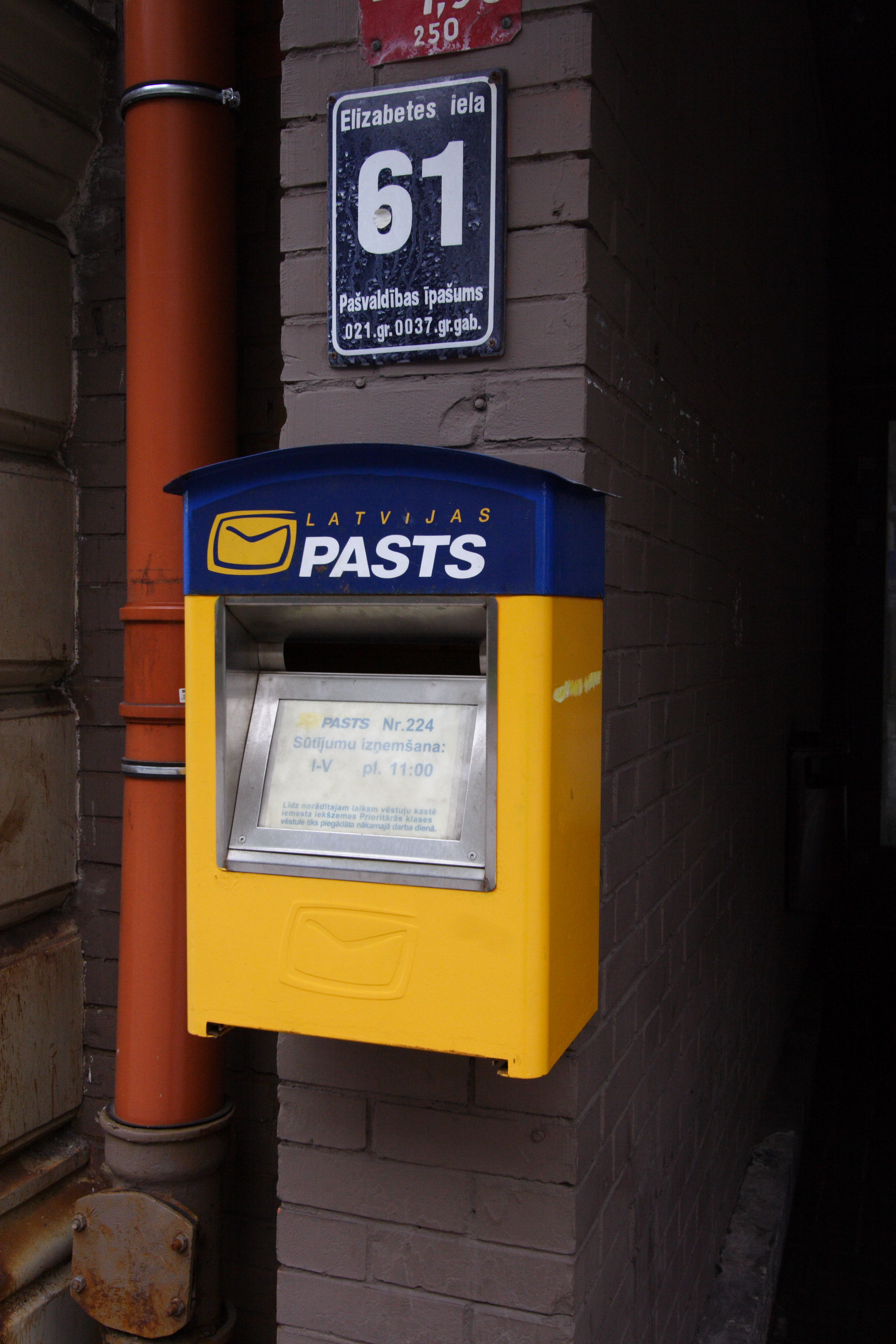 Elizabetes iela